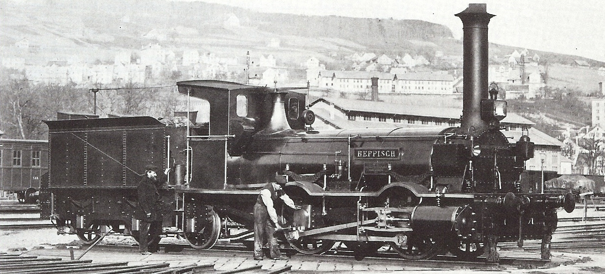 Dampflokomotive "Reppisch" der NOB Bauart D 2/2 Nummer 36. Aufnahme im Hauptbahnhof Zürich. Im Hintergrund das Quartier Zürich-Oberstrass